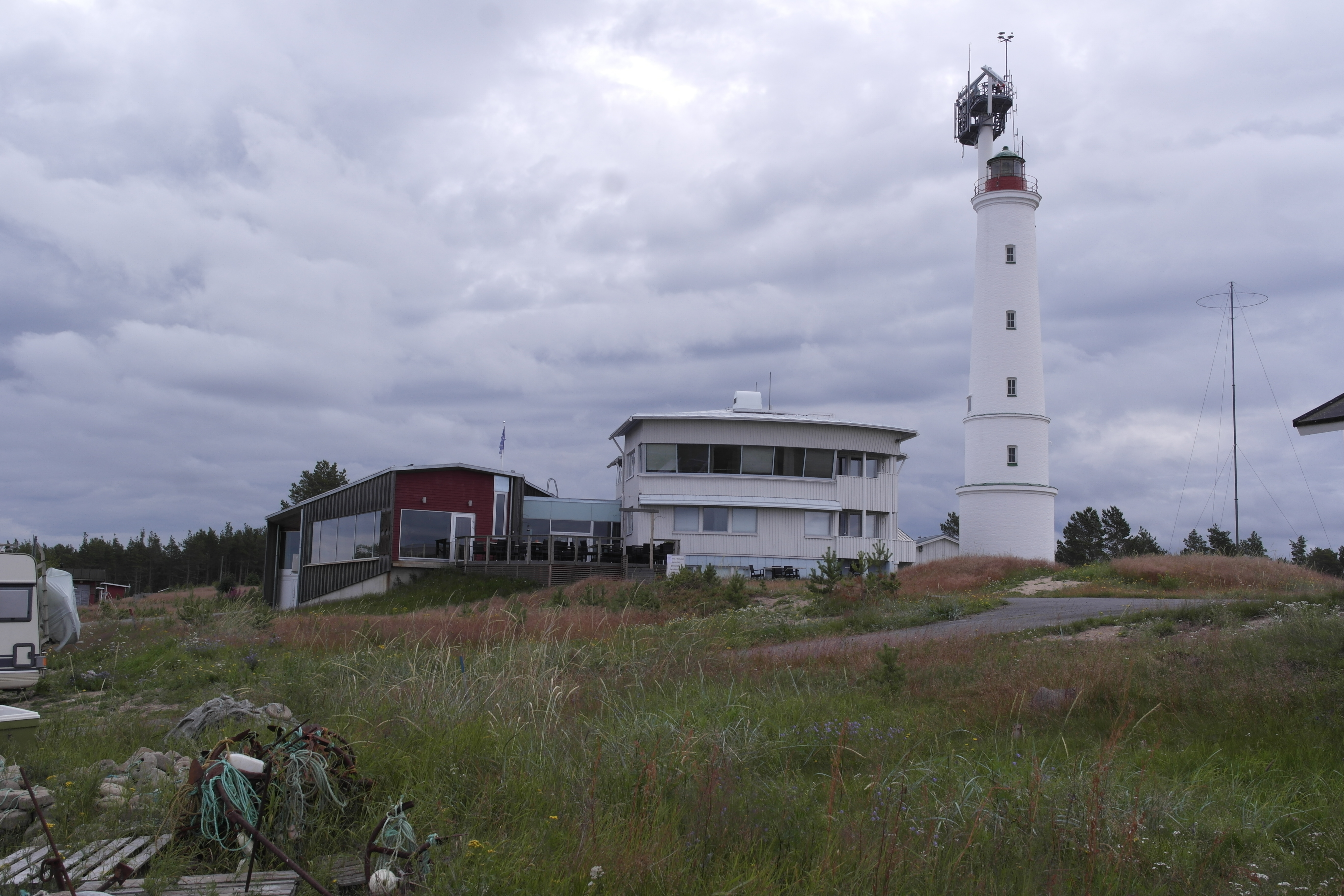 Hailuodon Luotokeskukseen kuuluvat Näköalaravintola Aava ja Luotsihotelli sekä Marjaniemen majakka elokuussa 2017